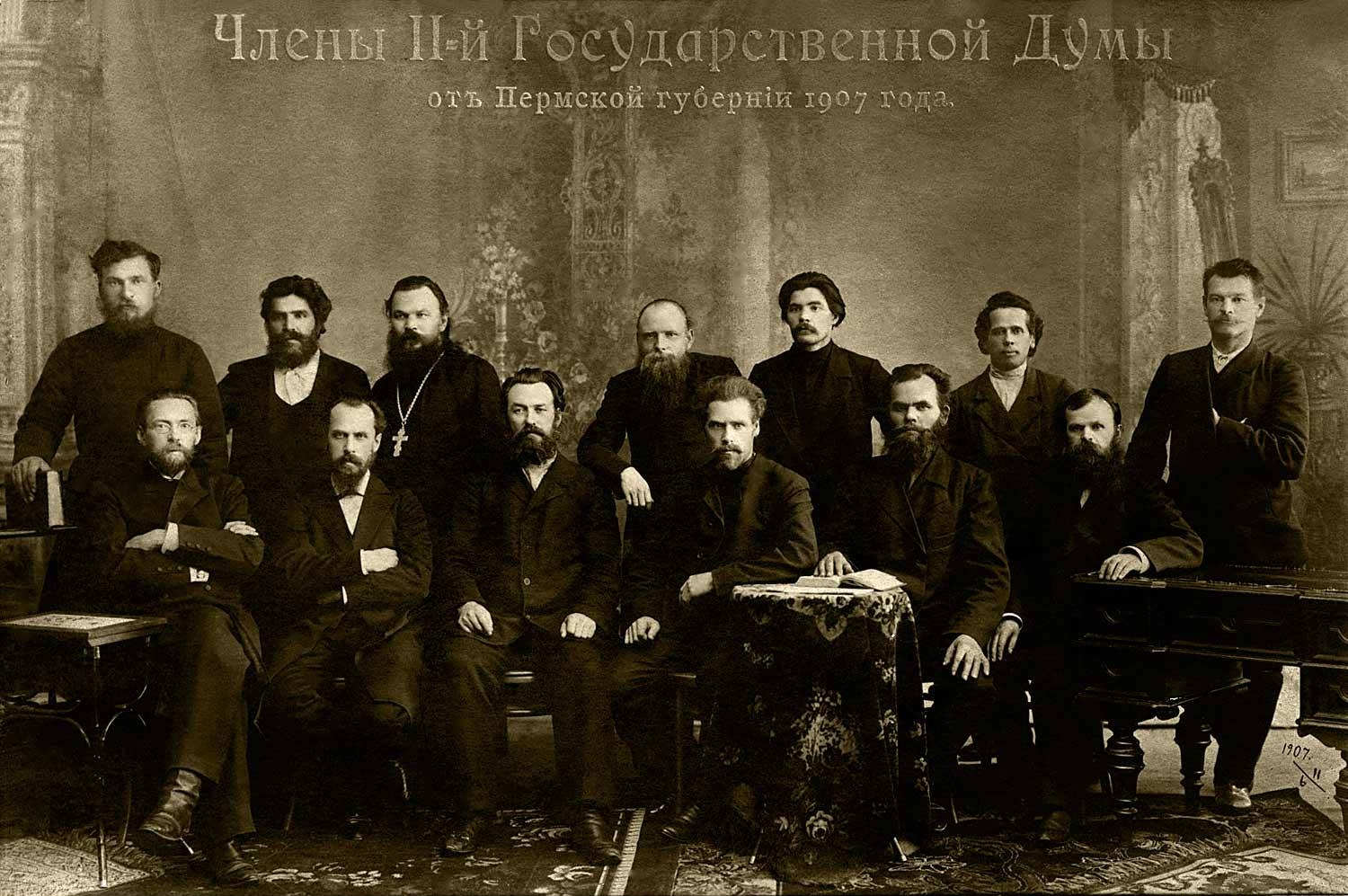 Члены 2-й Государственной думы от Пермской губернии 1907 Сидят: Мамин, Владимир Наркиссович Баскин, Григорий Иванович Захаров, Яков Евдокимович Шпагин, Алексей Алексеевич Кабаков, Гавриил Иванович Ершов, Василий Ефимович Стоят: Зырянов, Пётр Антонович Сигов, Павел Сергеевич Колокольников, Константин Александрович Петров, Егор Алексеевич Чащин, Василий Андреевич Тимачев, Филипп Яковлевич Максимов, Яков Павлович